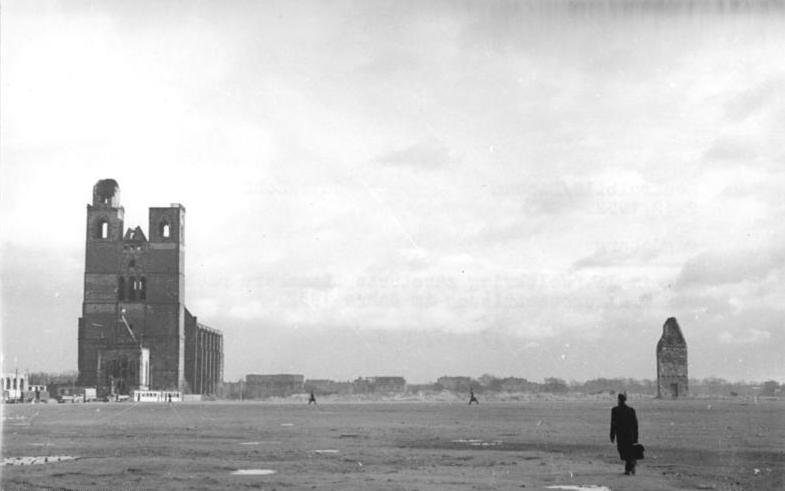 Zentralbild-Biscan Gott-Schä 2.12.1952 Magdeburg Der im II. Weltkrieg zerstörte Stadtkern nach der Trümmerbeseitigung im Jahre 1952. l. Johanniskirche siehe auch Vergleichsfoto Nr. 17417-7N und 17417-9N